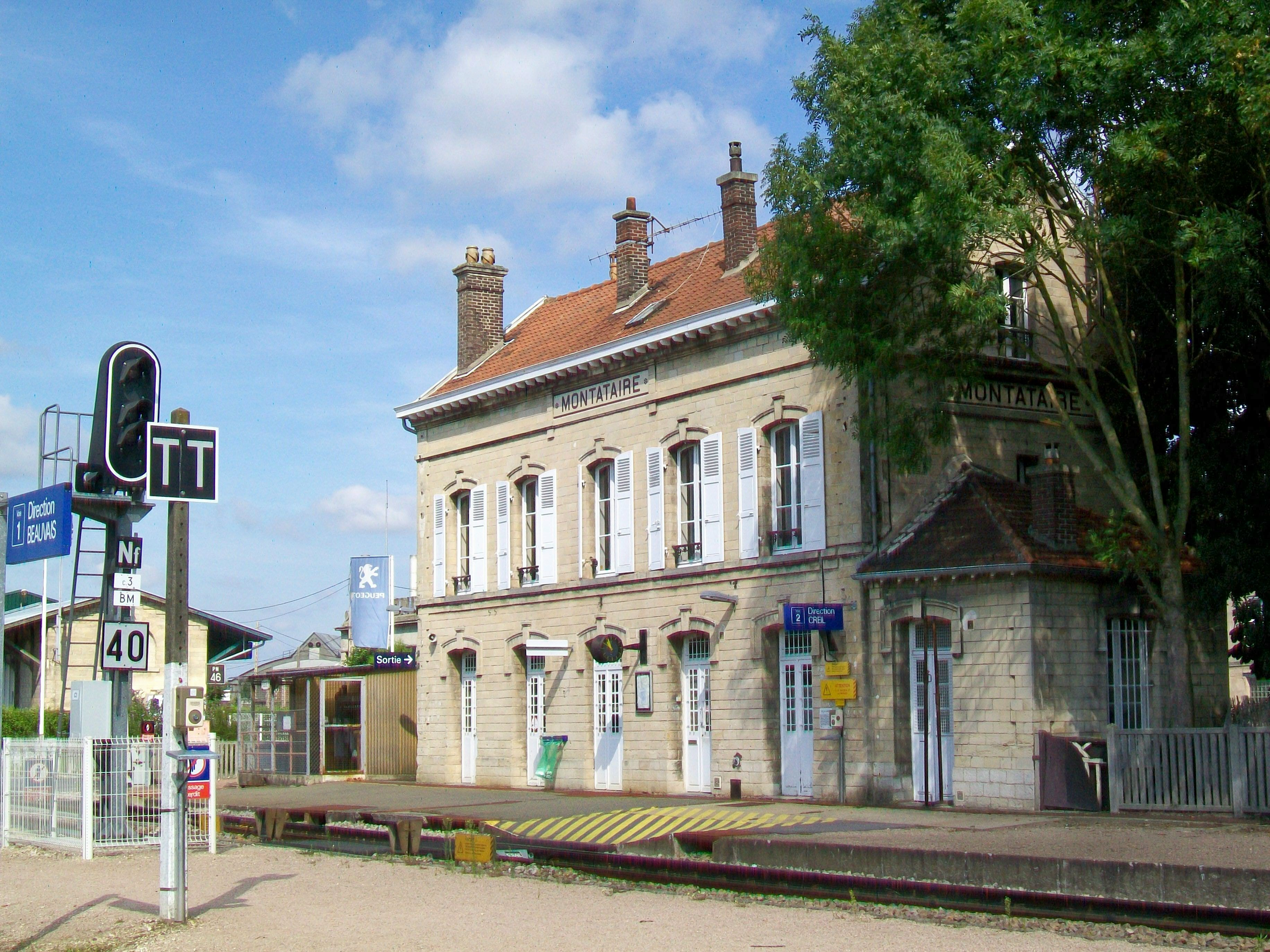 Le bâtiment-voyageurs côté quais ; au premier plan, le quai en direction de Beauvais.